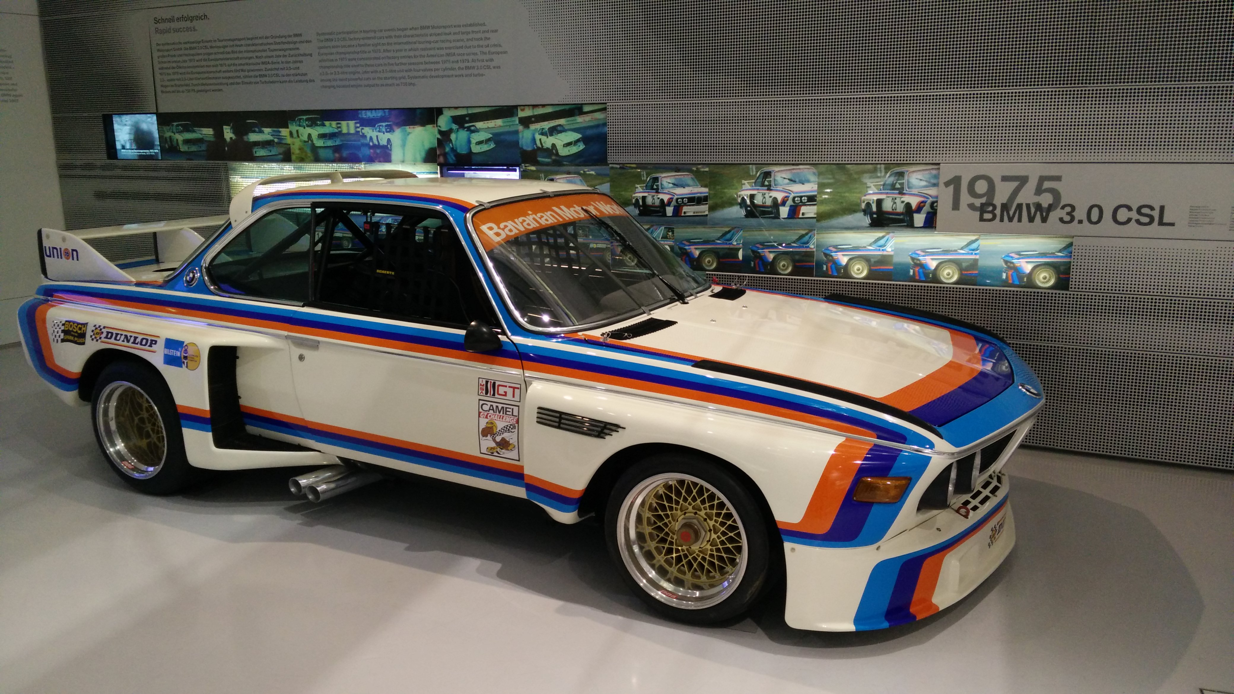 IMG_20141113_120204